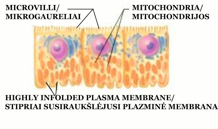 Inkstų proksimalinio vingiuotojo kanalėlio epitelis